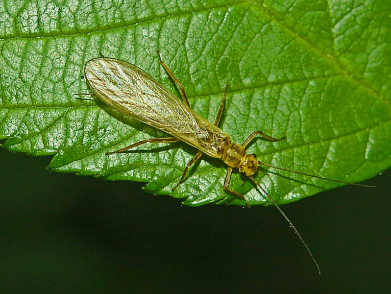 Isoperla carbonaria